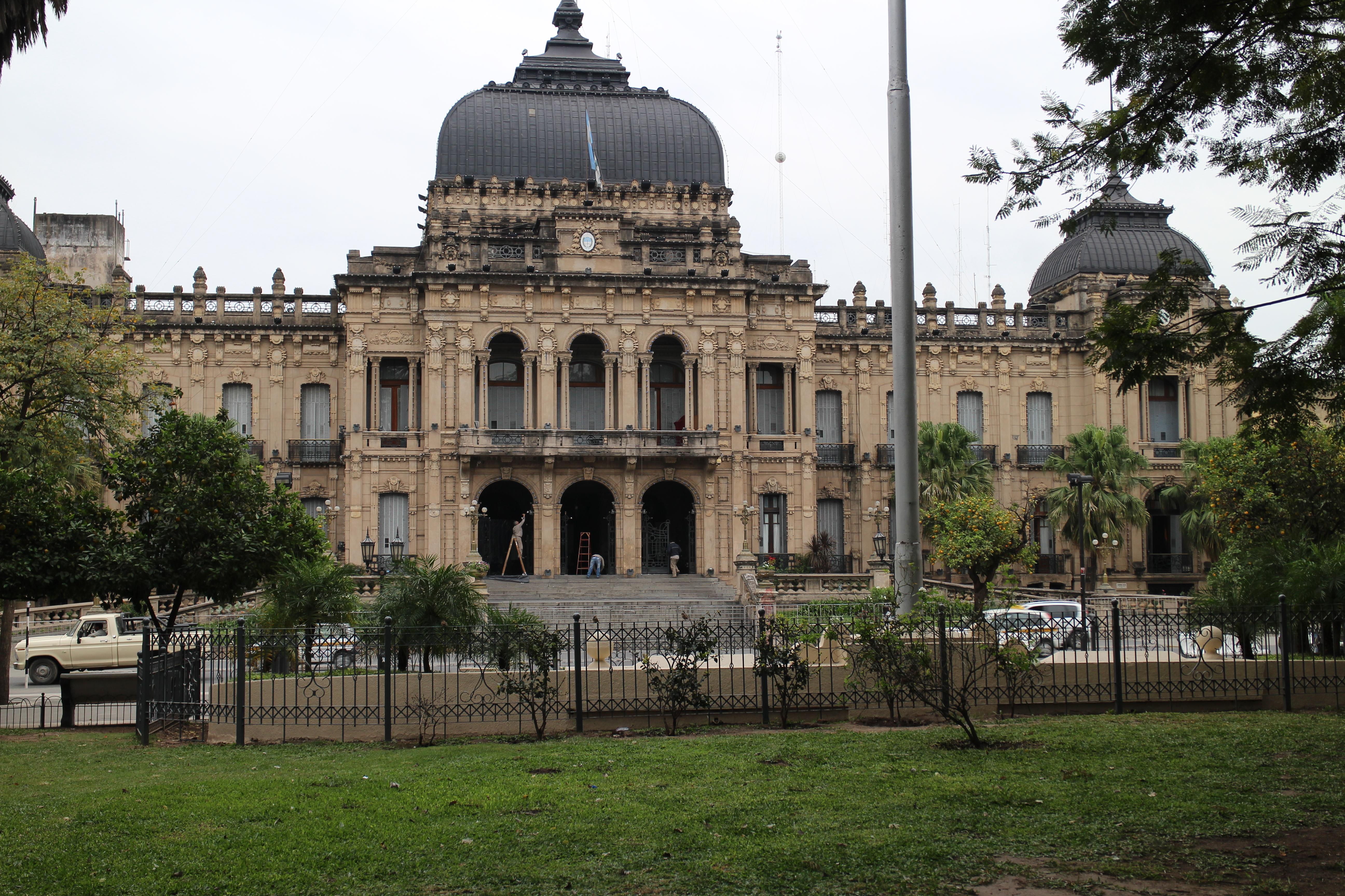 casa de gobierno